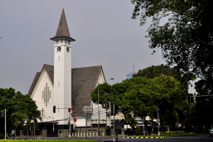 GPIB Paulus 2013